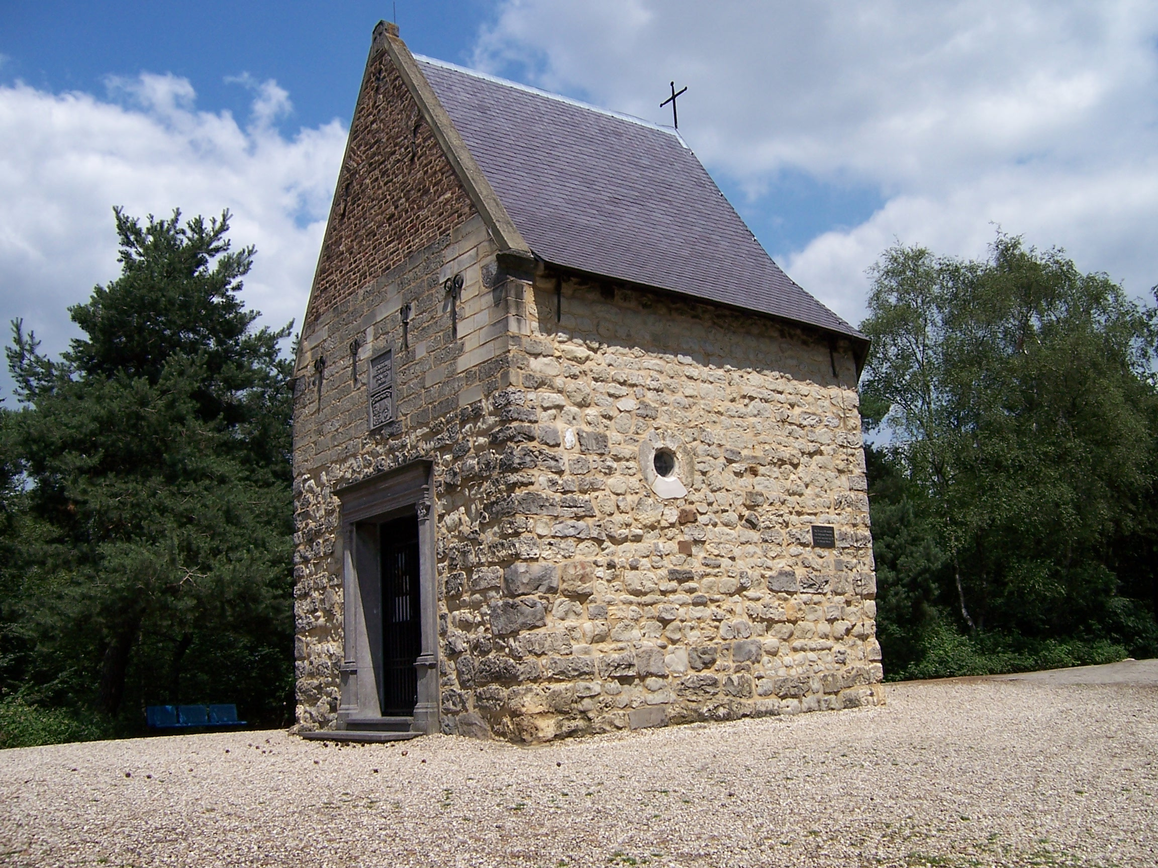 Kapel Leenhof